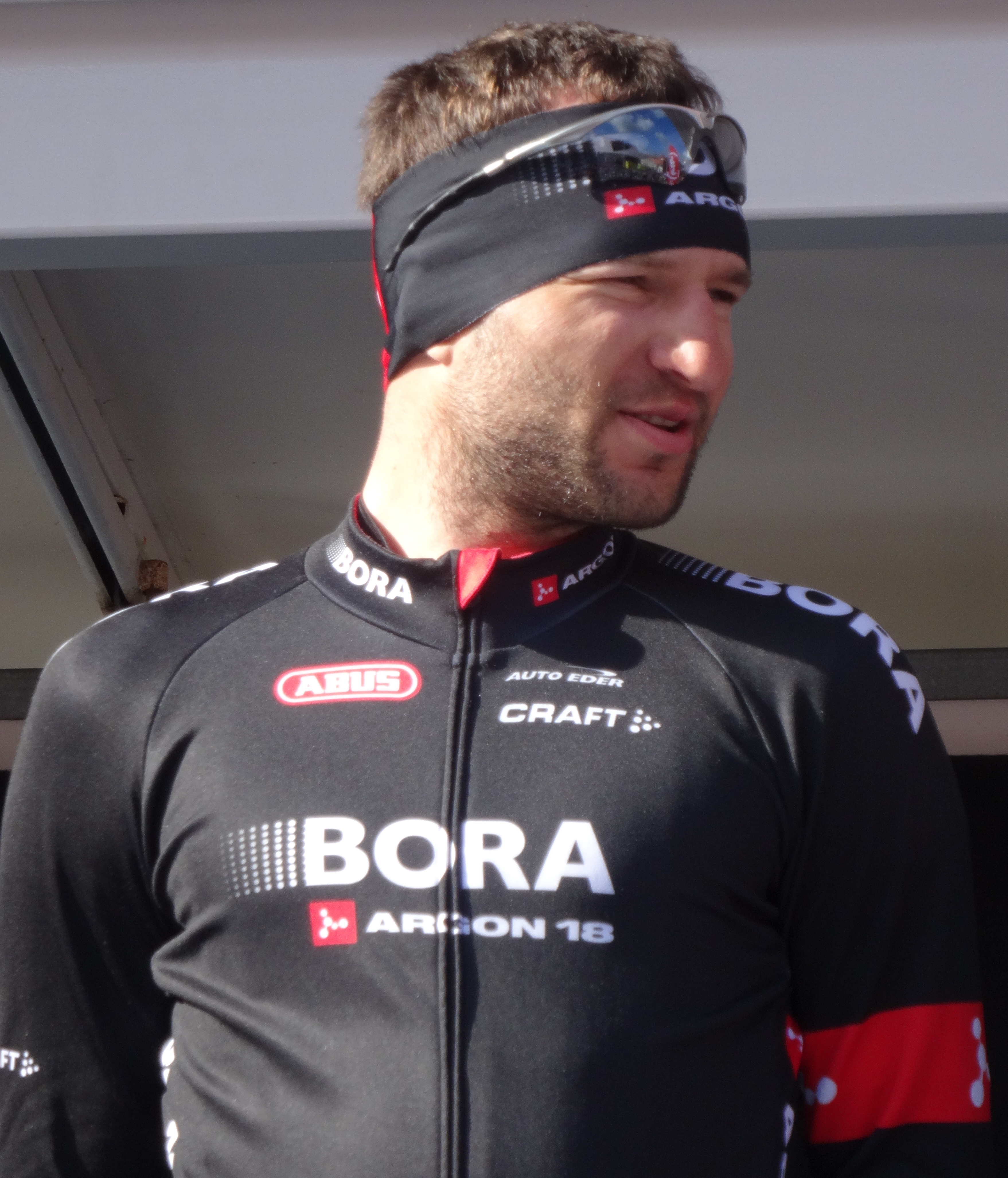 Reportage réalisé le mercredi 4 mars à l'occasion du départ du Samyn des Dames 2015 et du Samyn 2015 à Quaregnon, Belgique.